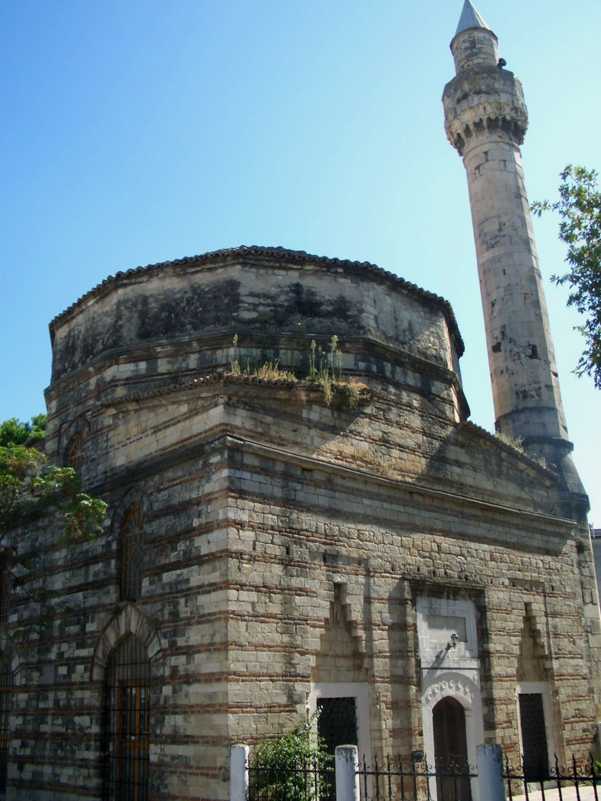 Alte Moschee in Vlora (15. Jhdt.)